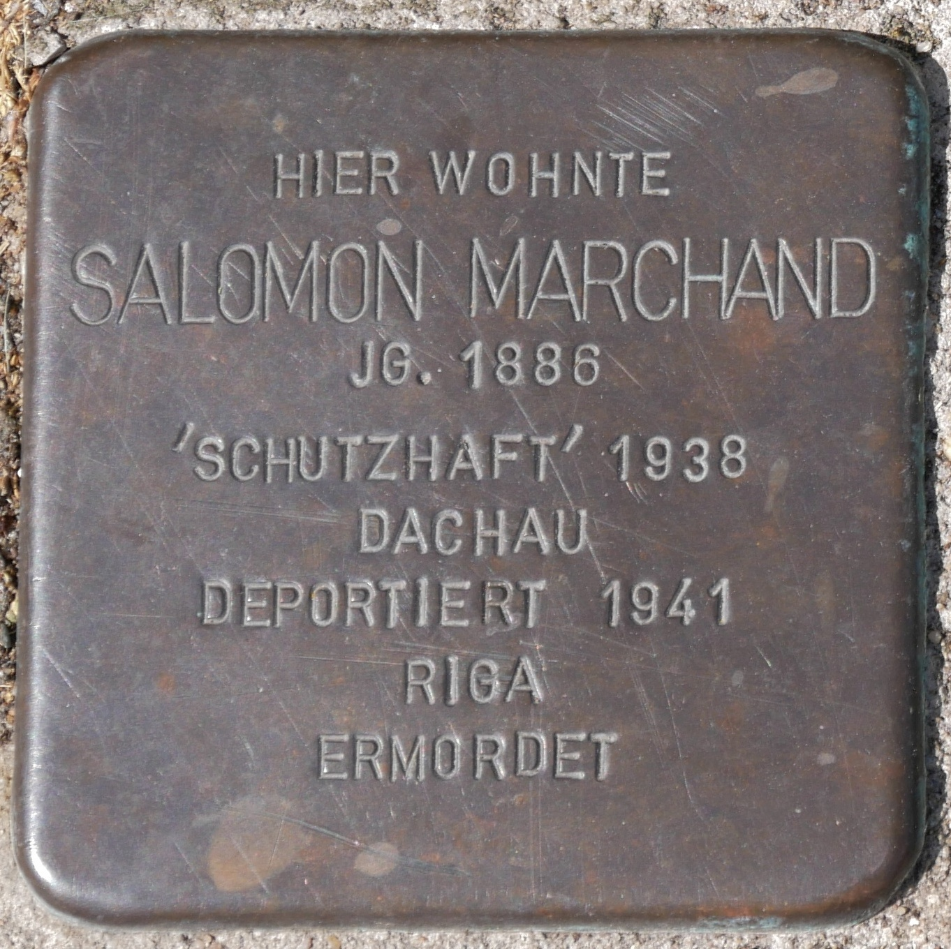 Stolpersteine Wesel: Marchand, Salomon